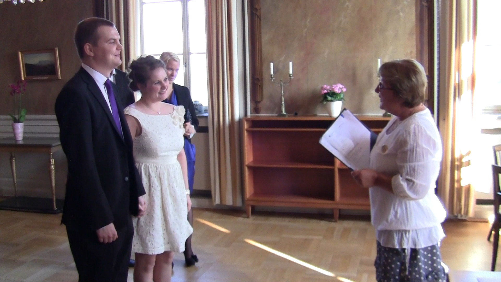 Borgerlig vigsel mellan Albin Olsson och Josefin Larsson, i Rådhuset i Göteborg.